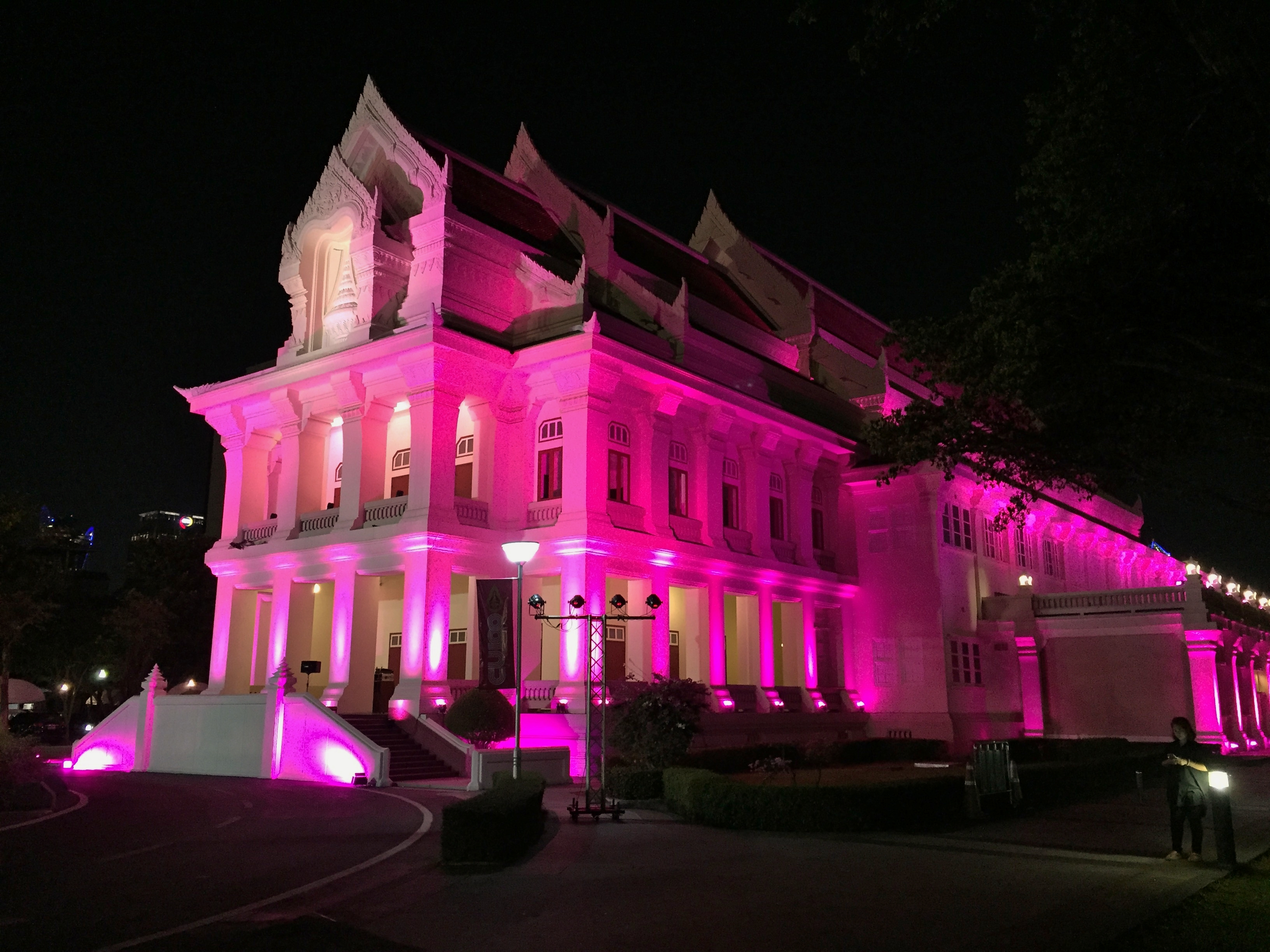 หอประชุมจุฬาลงกรณ์มหาวิทยาลัยประดับไฟในงาน จุฬาฯ Expo 2017 หรืองานจุฬาฯวิชาการ ครั้งที่ 15